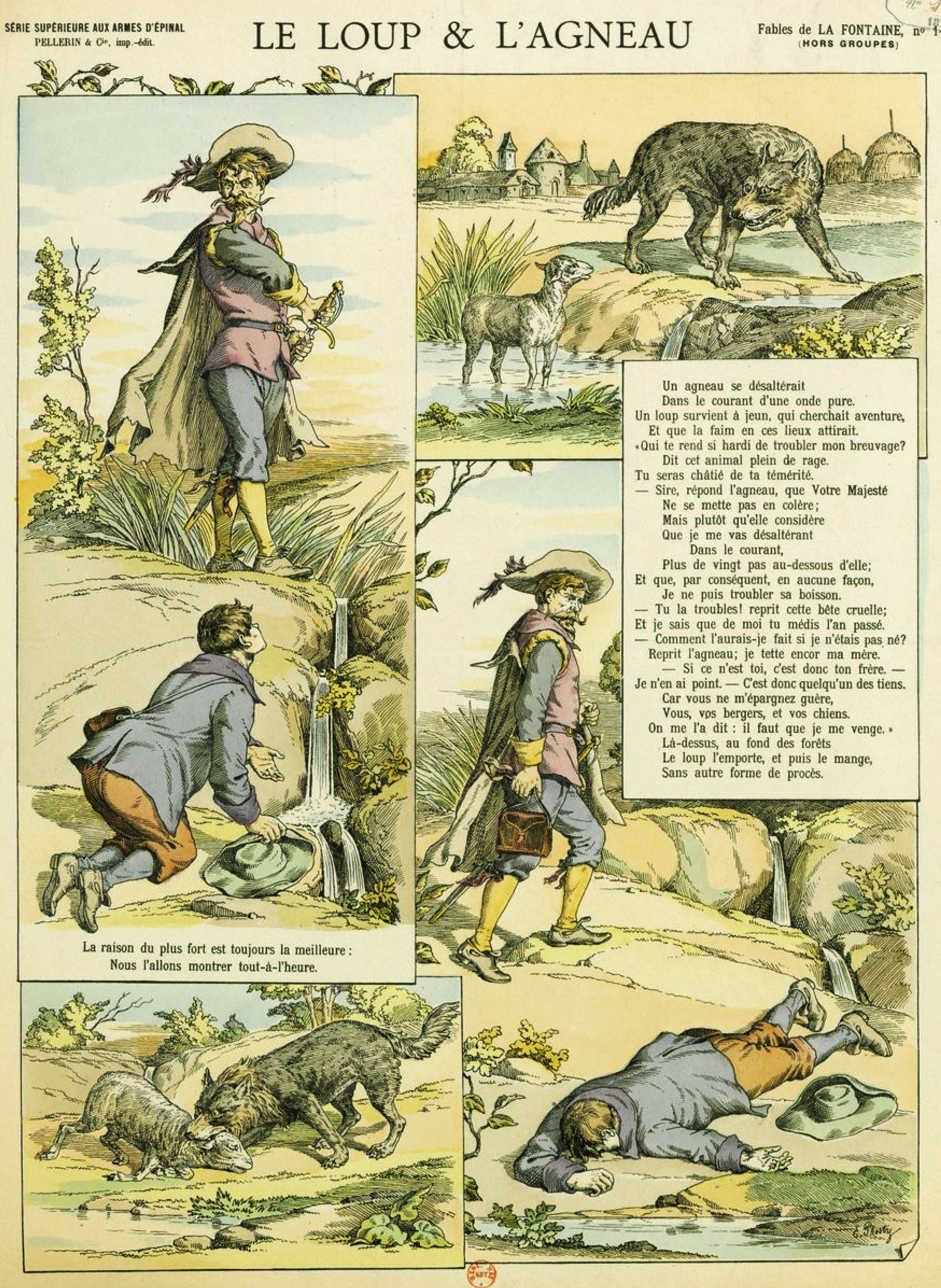 Estampe réalisée par E. Phosty représentant la fable Le Loup et l'Agneau de Jean de La Fontaine (Epinal, édition Pellerin & Cie, 1895).